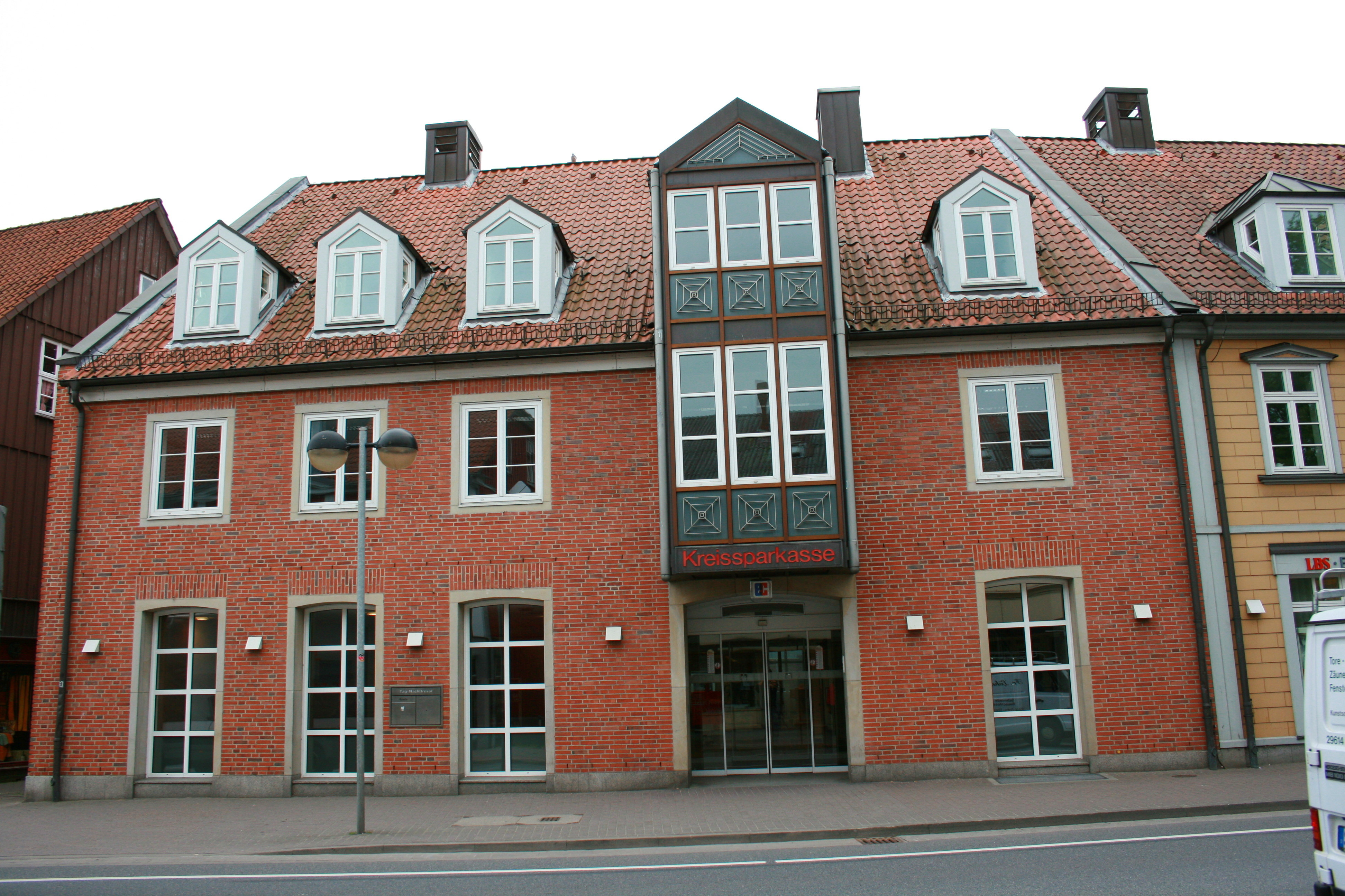 Poststraße in Soltau